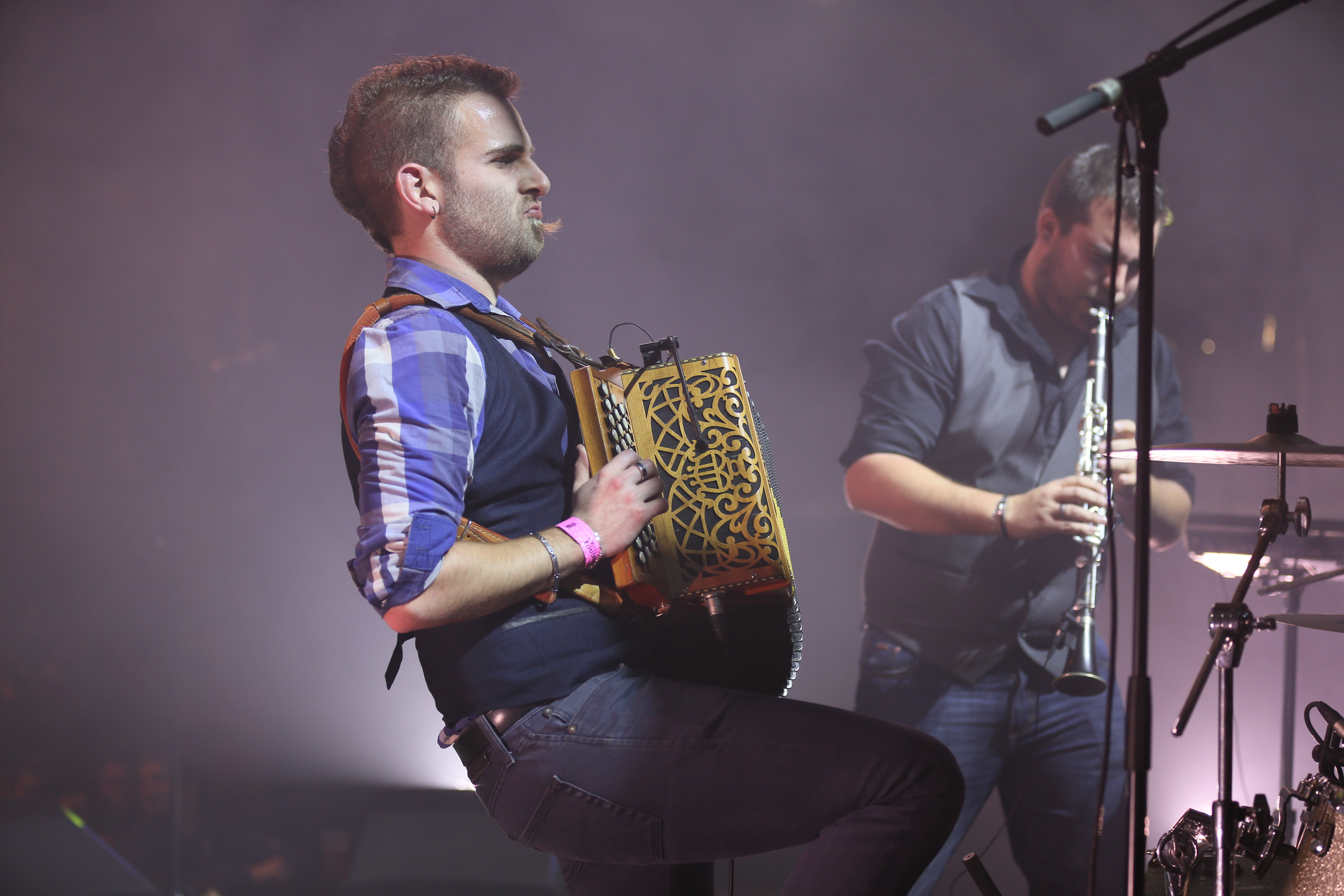 Trio JMK au fest-noz du festival Yaouank le 21 novembre 2015 au Parc des Expositions de Rennes.